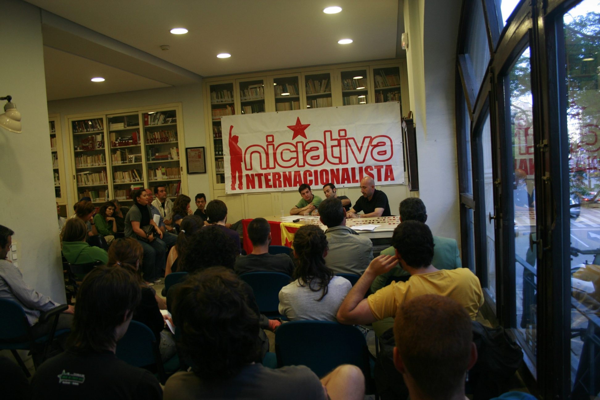 Presentación de la organización política española Iniciativa Internacionalista - La Solidaridad entre los Pueblos en Valencia